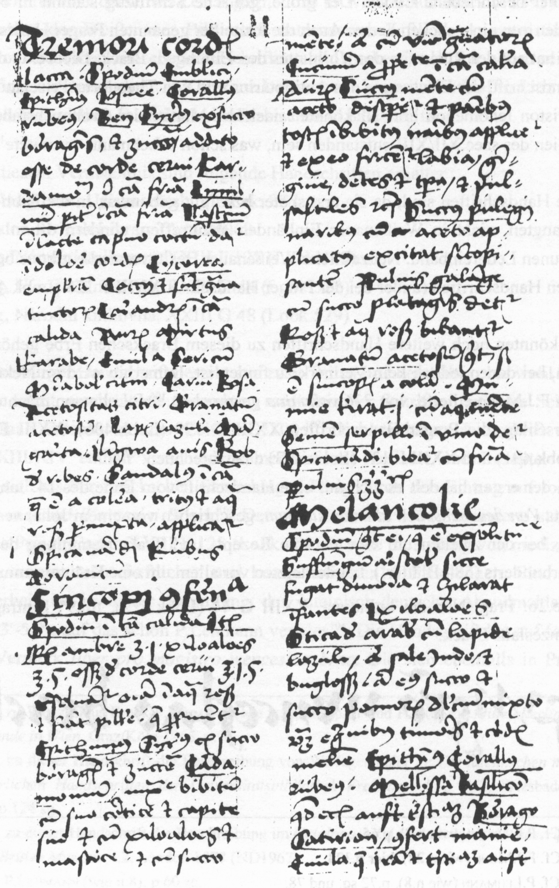 Freiburg, Universitätsbibliothek Ms. 387, fol. 14v (früher Kloster Weißenau aus dem Vermächtnis Wenzeslaus Brack), Autograph des Wenzeslaus Brack in gotischer Kursive